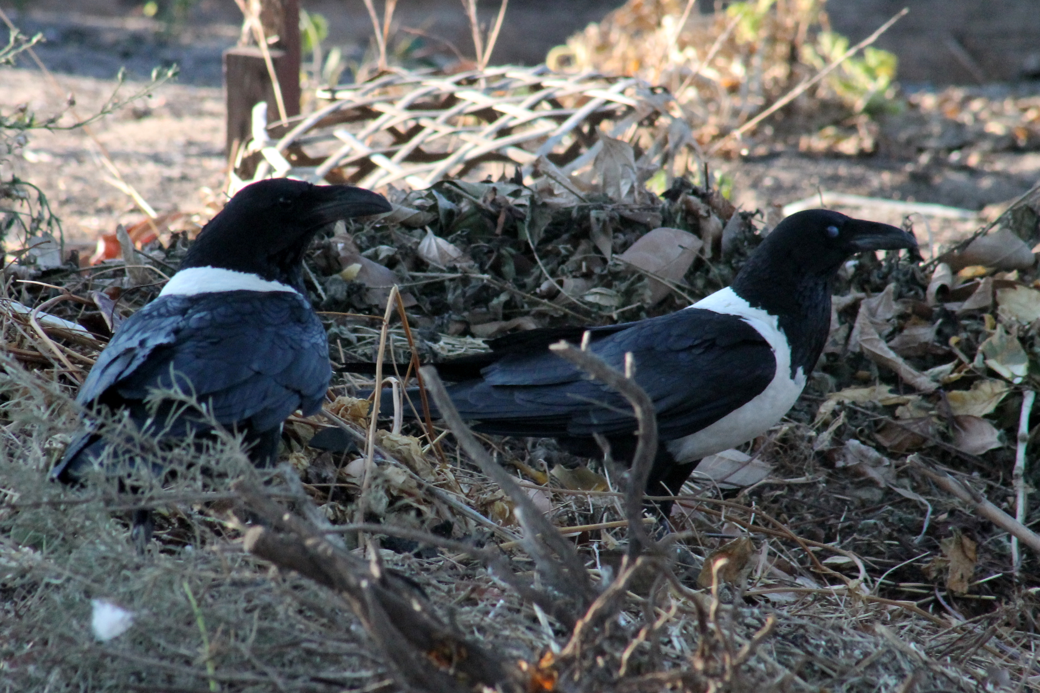 Schildraaf, Madagaskar